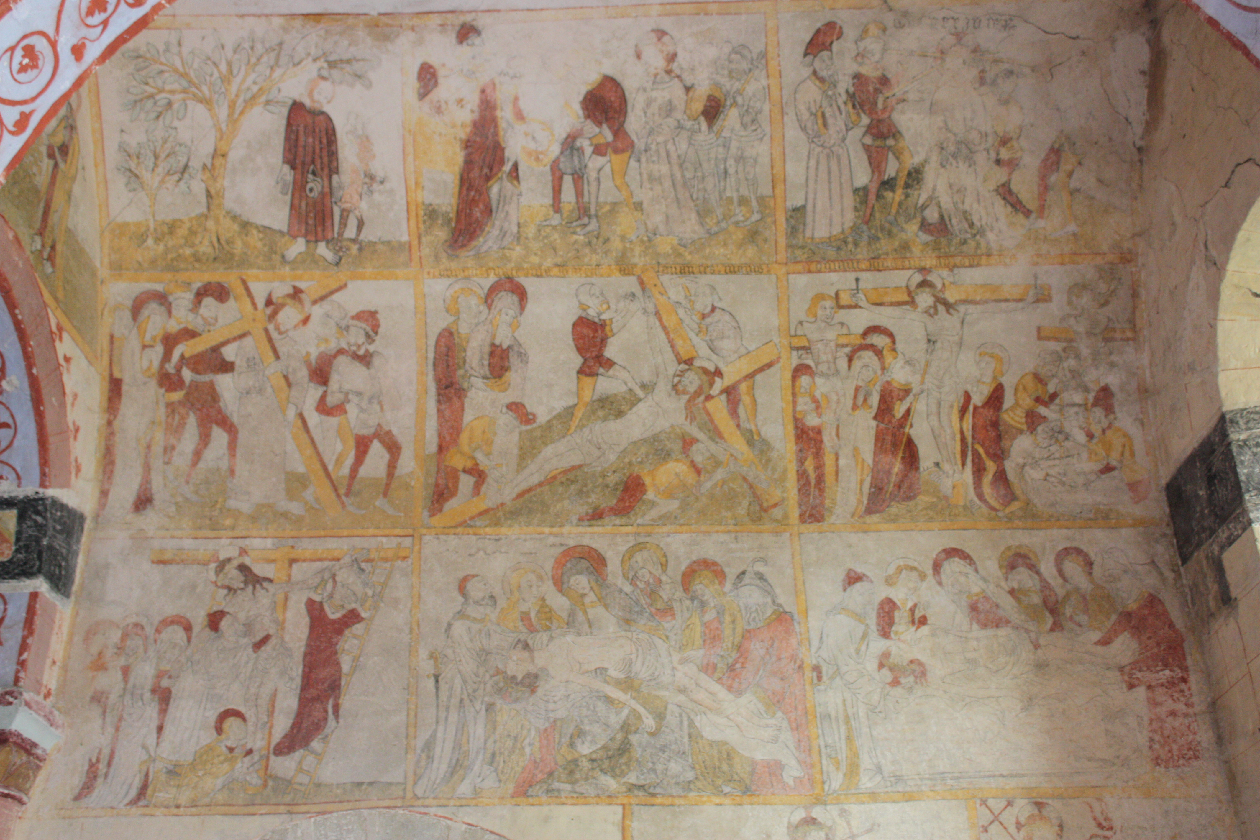 Jenzat - Église Saint-Martin